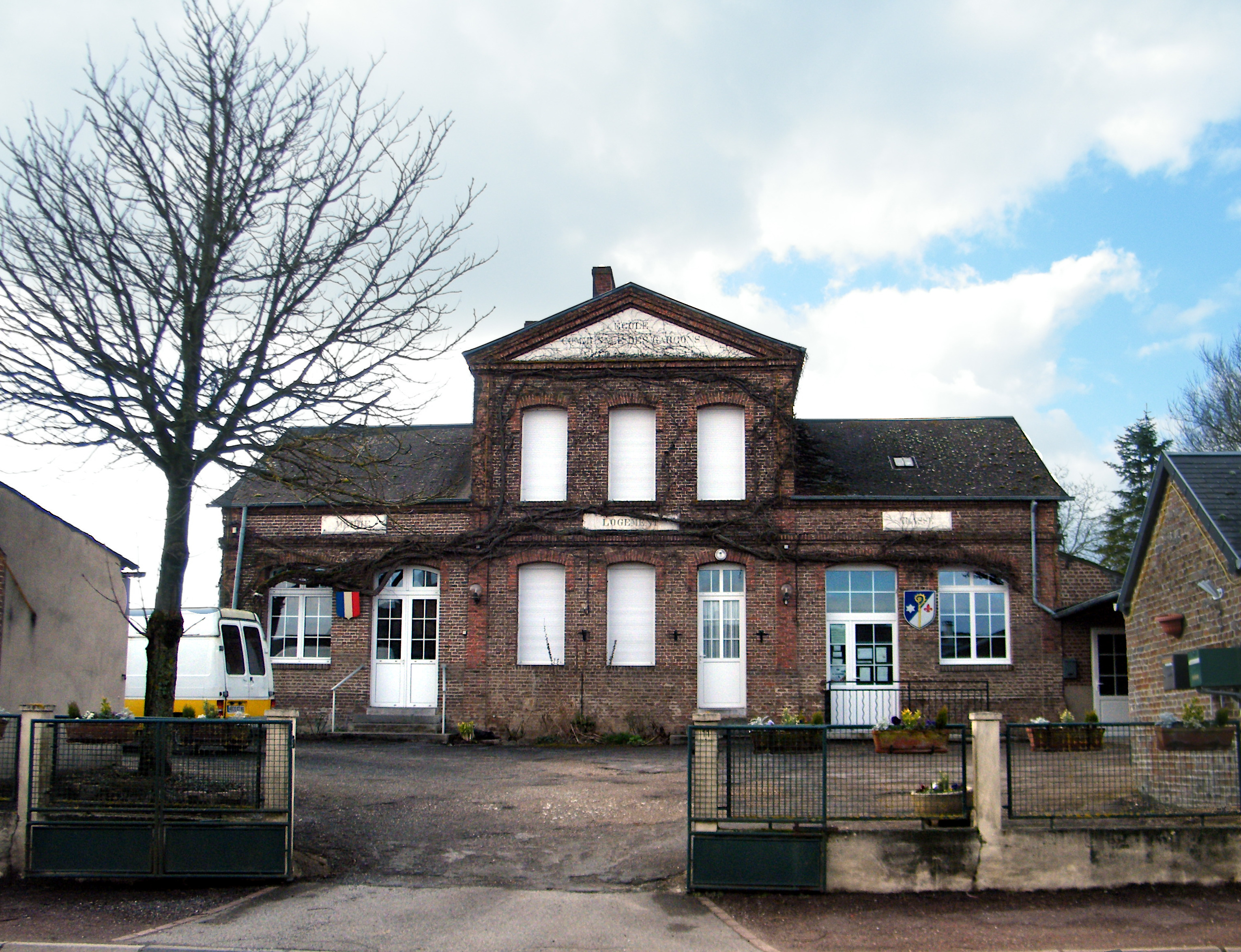 La mairie-école : mairie et ancienne école fermée en 2010.